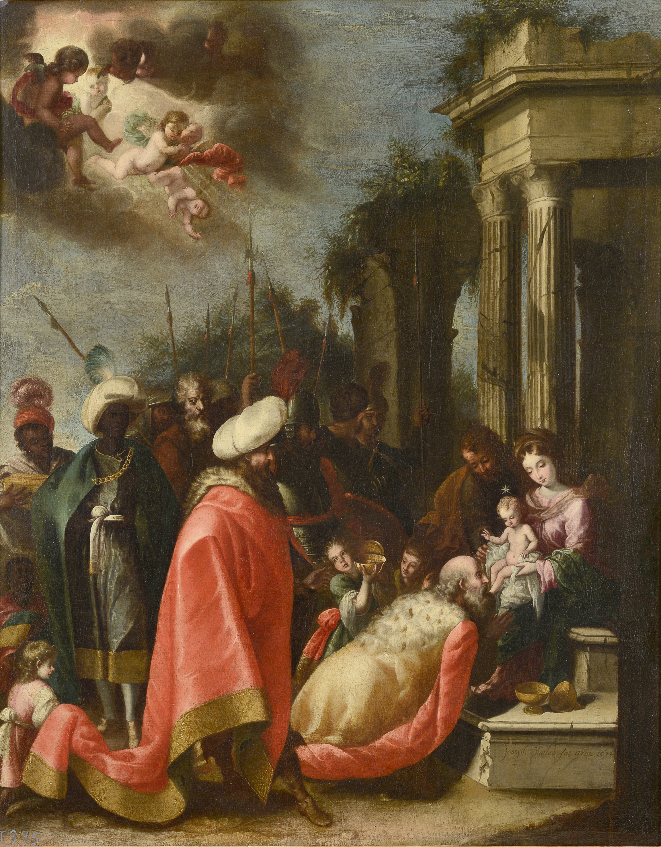 La obra representa el momento en que el Niño Jesús fue adorado por los tres Reyes magos.